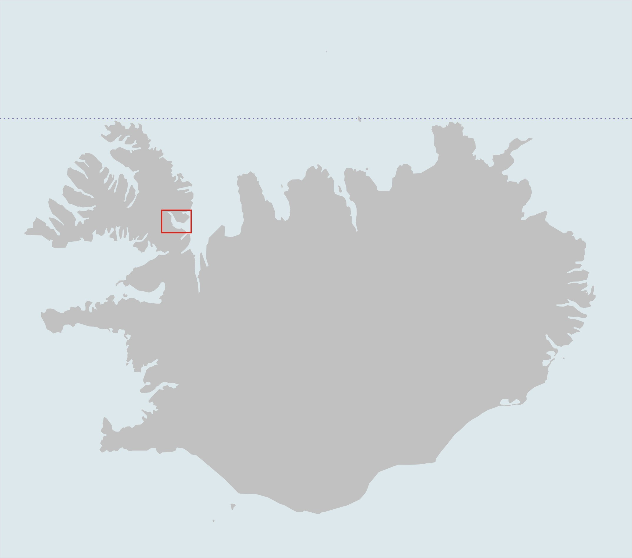 Lage des Steingrímsfjörður in Island Verfasser: varp